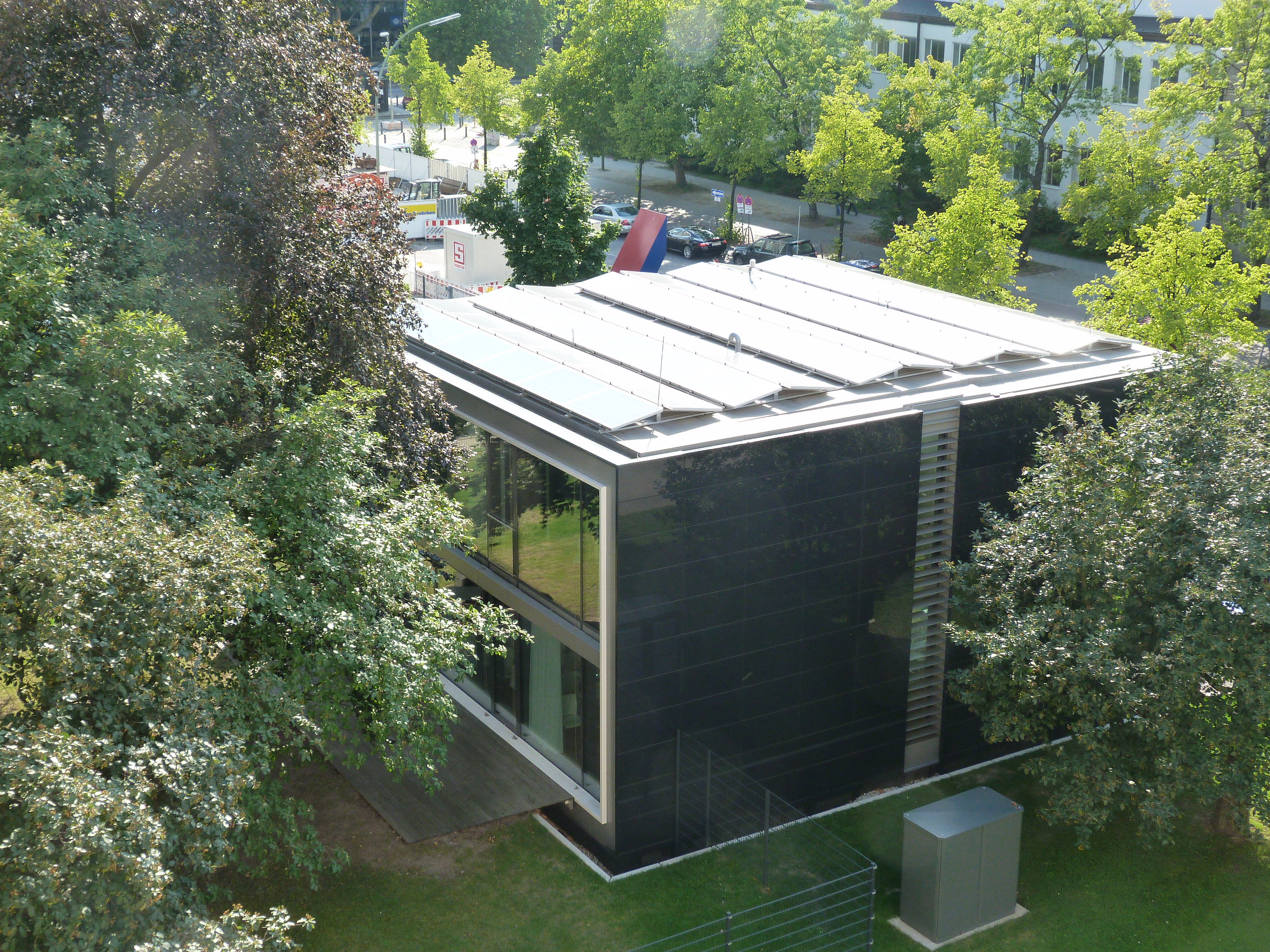 Vogelperspektive